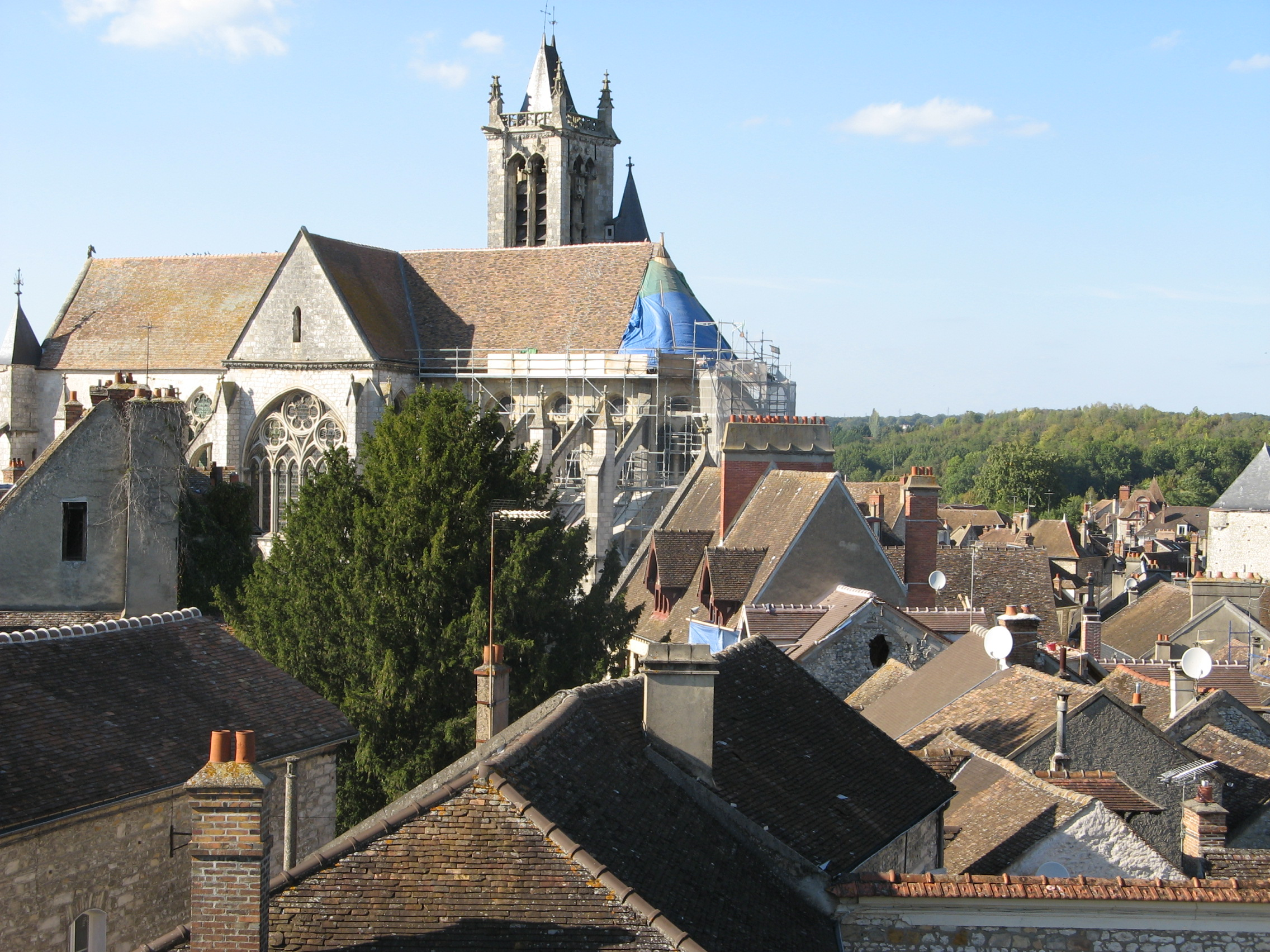 Moret-sur-Loing vu du Donjon. L'église, en travaux, au centre. Moret-sur-Loing, Seine-et-Marne, France.